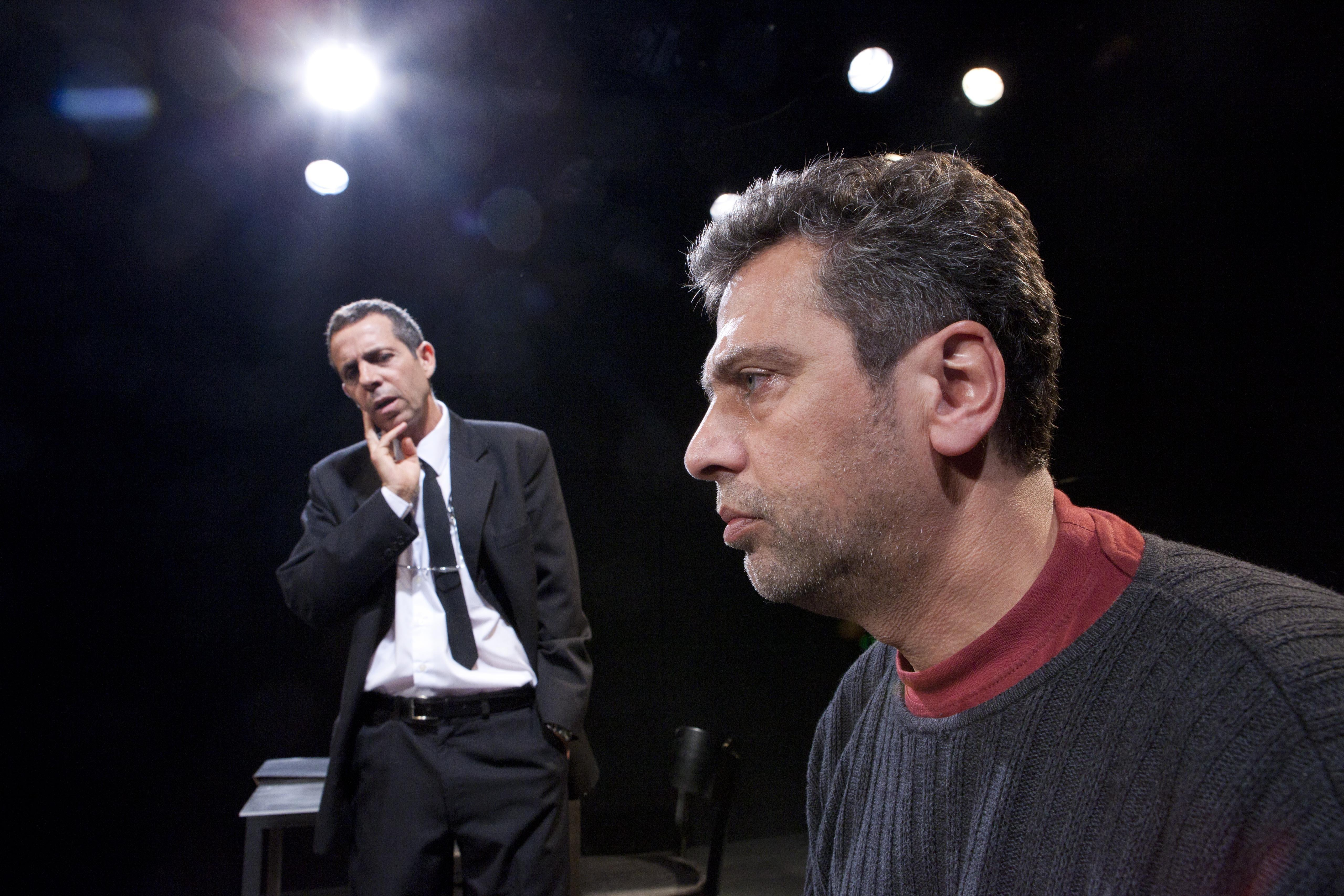 ח'ליפה נאטור ואיצ'ו אביטל בהצגה "יוליסס על בקבוקים", מאת גלעד עברון, בבימויה של אופירה הניג, תיאטרון חיפה